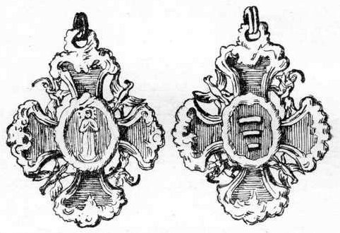 Ilustracja do Encyklopedii staropolskiej T.3 310 - Krzyż kanoniczek warszawskich